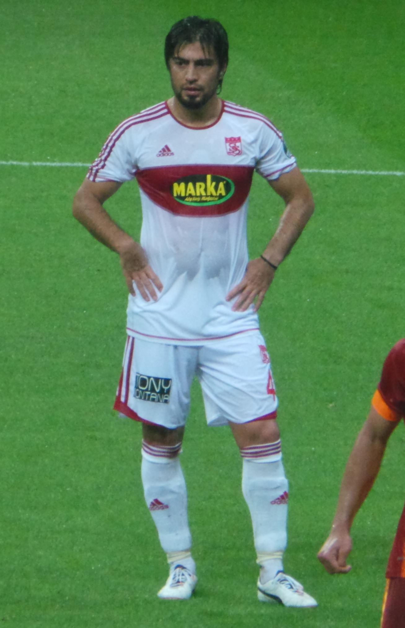 İbrahim Toraman sivasspor ile